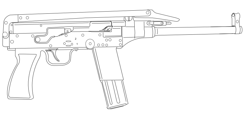 Type 79 SMG